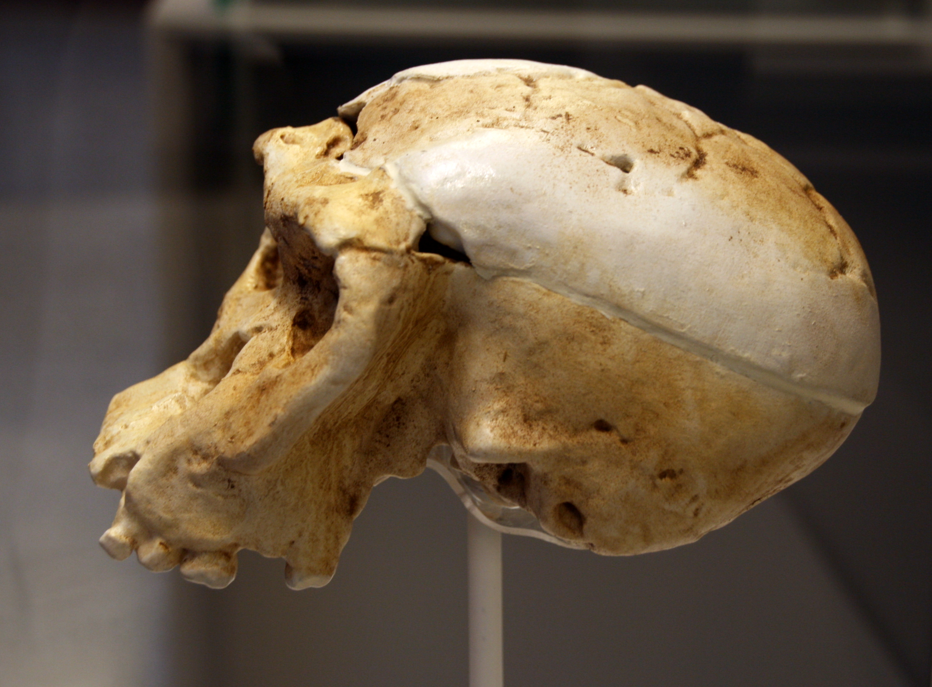 Cráneo y calota de Homo habilis, OH 24 o "Twiggy". Réplica Original: inmediaciones de DK, Garganta de Olduvai (Tanzania). 1,8 millones de años Museo Nacional de Dar Es Salaam (Tanzania) Réplica: Instituto de Evolución en África Exhibido en exposición temporal, "La cuna de la humanidad", en el Museo Arqueológico de Regional de Madrid